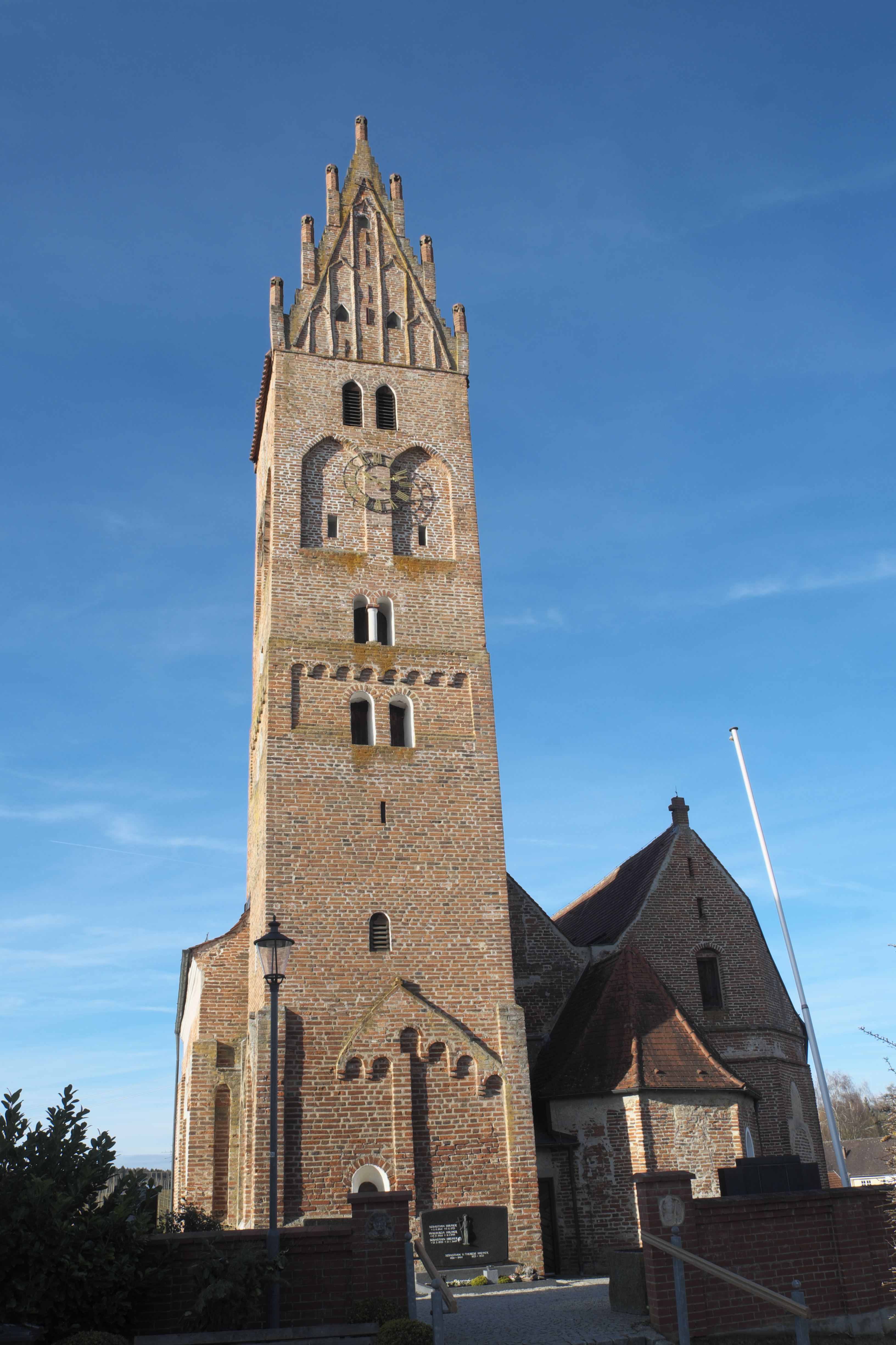 Katholische Kirche St. Peter und Paul in Ebrantshausen (Mainburg) im niederbayerischen Landkreis Kelheim (Bayern/Deutschland)